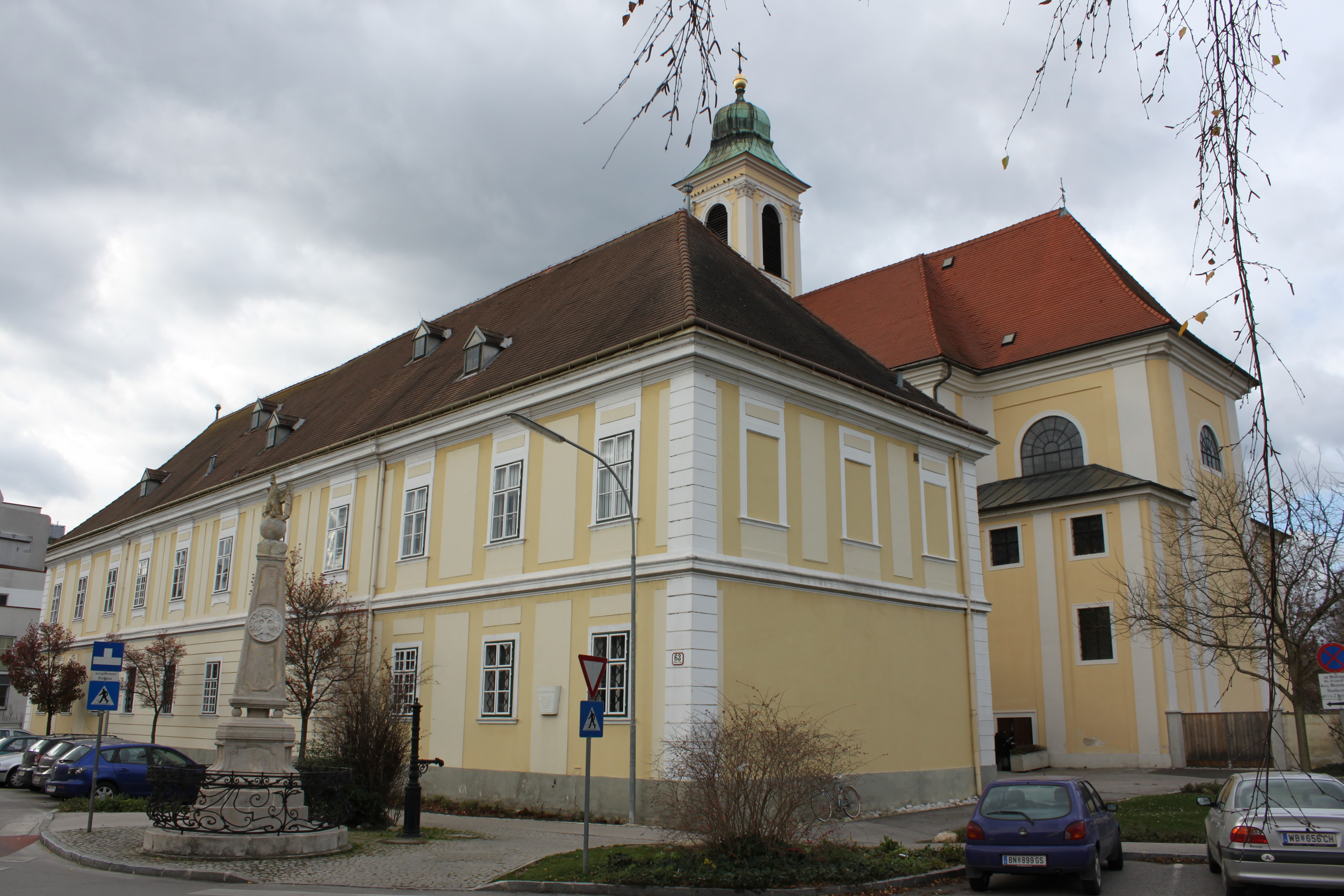 Stadtarchiv Wiener Neustadt, ursprünglich Jesuitenkolleg, davor der Kaiserbrunnen, mit dem Kaiserbrunnendenkmal aus dem 18. Jahrhundert, dahinter die ehemalige Jesuitenkirche, jetzt Vorstadtkirche (Wiener Neustadt)